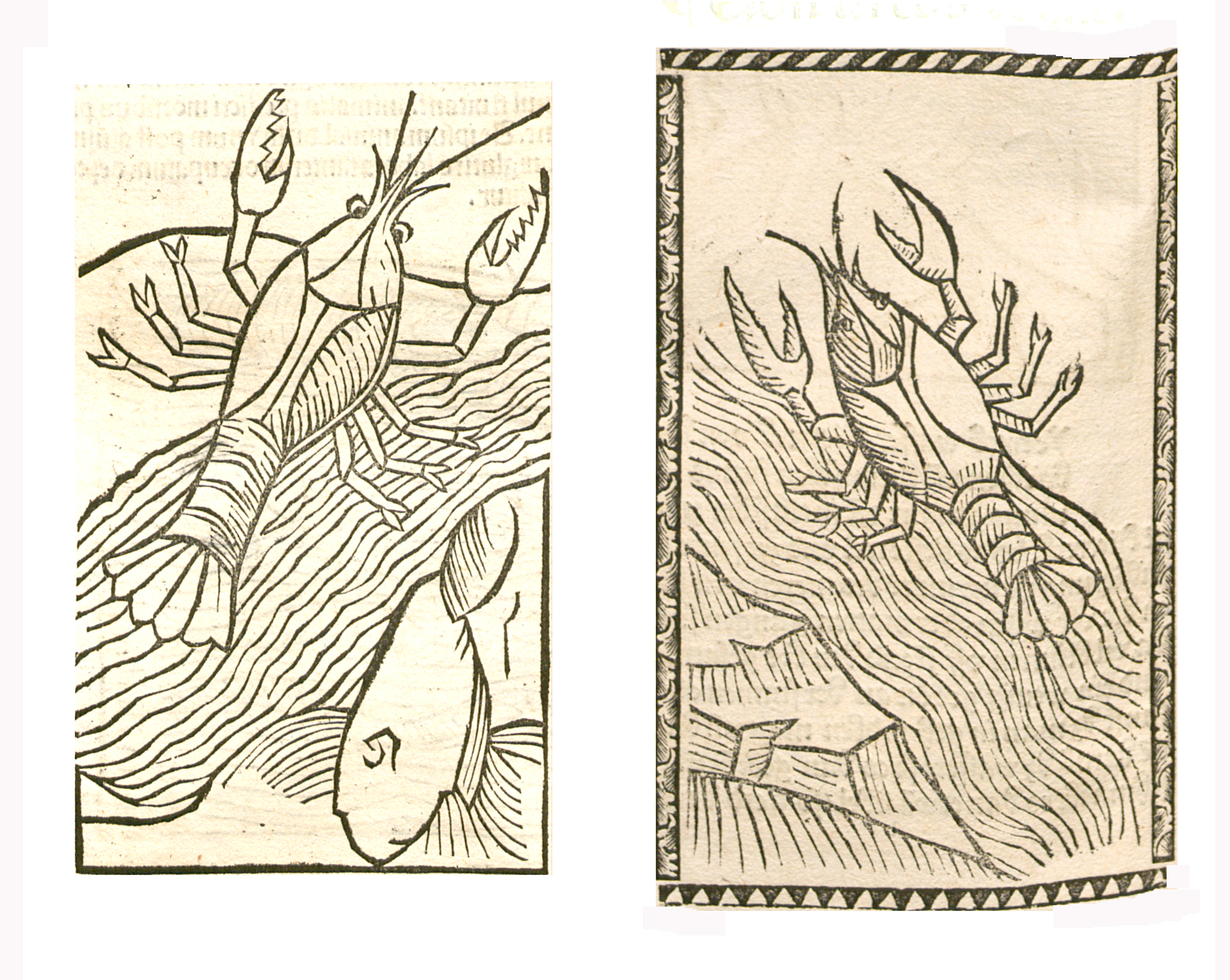 Abbildung von Krebs